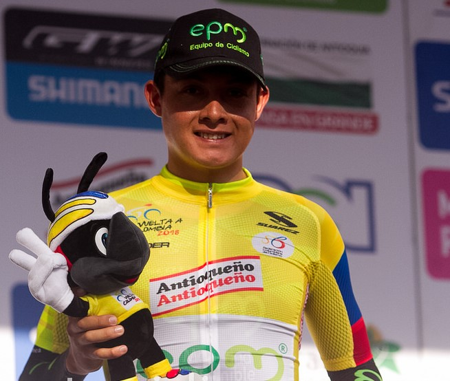 Rodrigo Contreras, líder de la clasificación general, Prólogo en la Vuelta a Colombia 2018